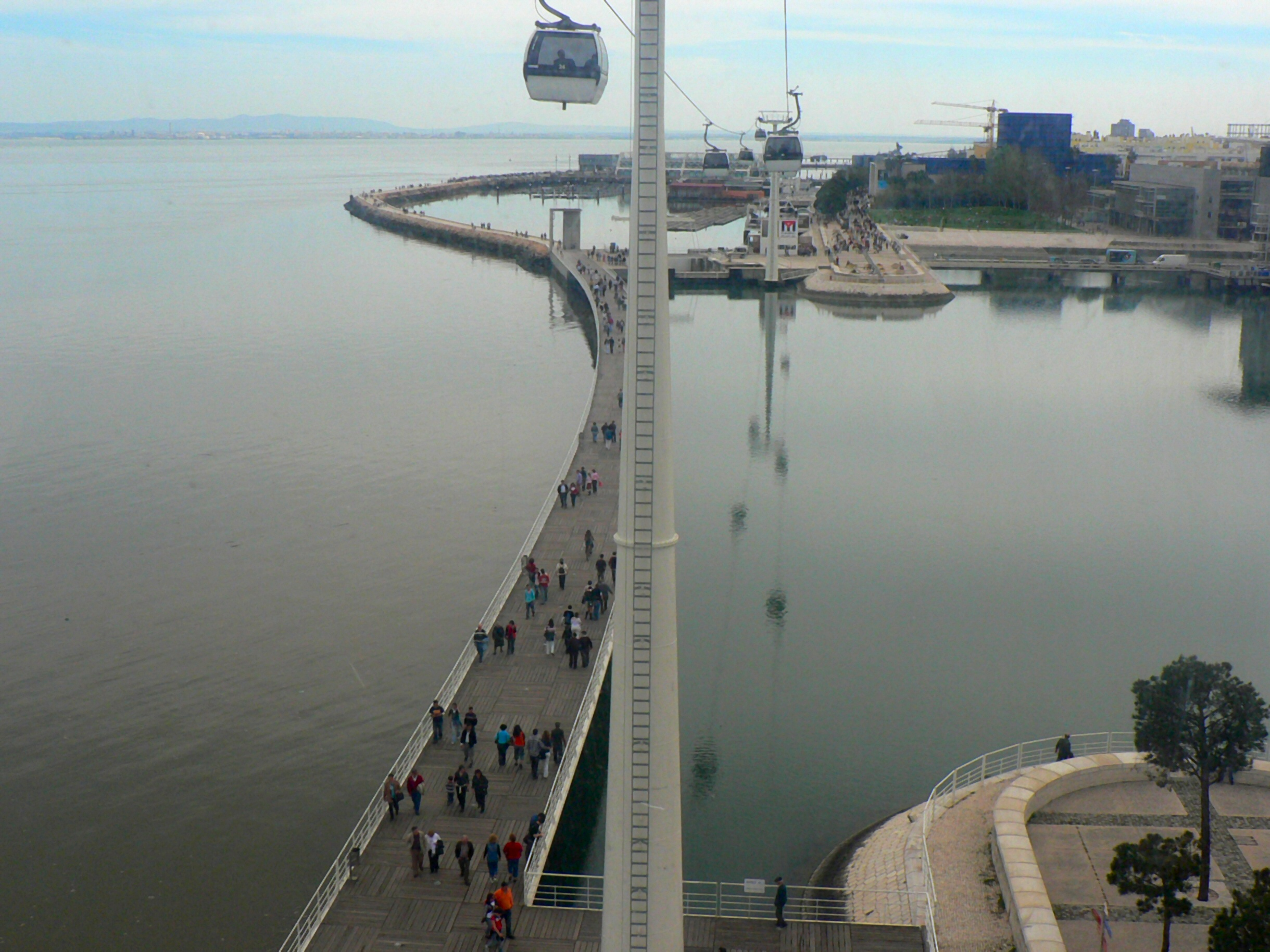 Parque das Nações em Lisboa (Vista do teleférico)